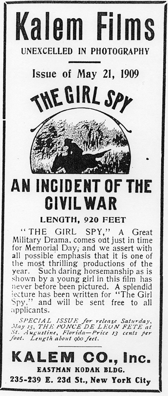 Publicité du film The Girl Spy: An Incident of the Civil War, produit par Kalem, publiée par je journal professionnel The Moving Picture World